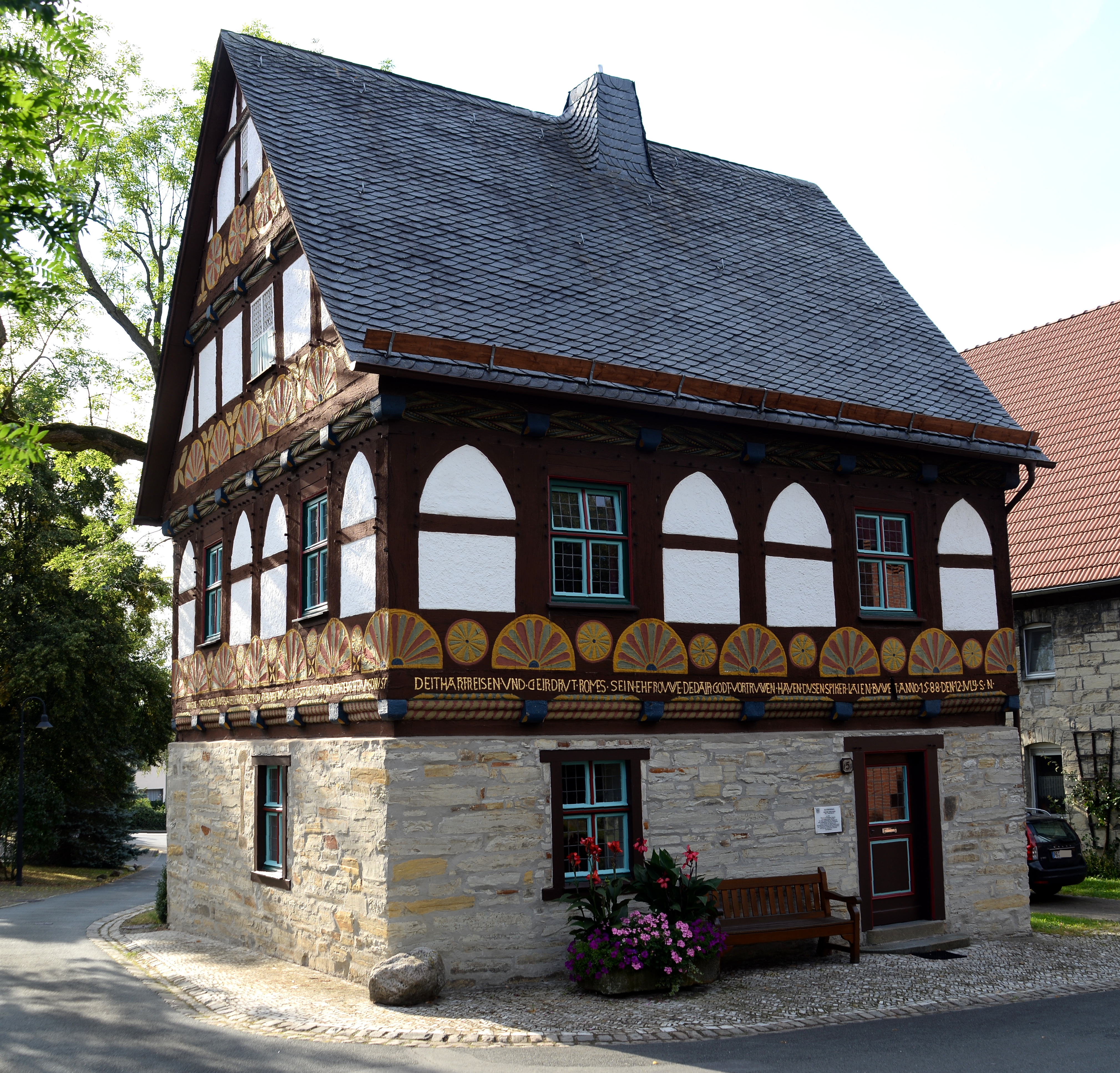 Vom Heimatverein optimal restaurierter Speicher in der Ortsmitte von Atteln This is a photograph of an architectural monument.It is on the list of cultural monuments of Lichtenau